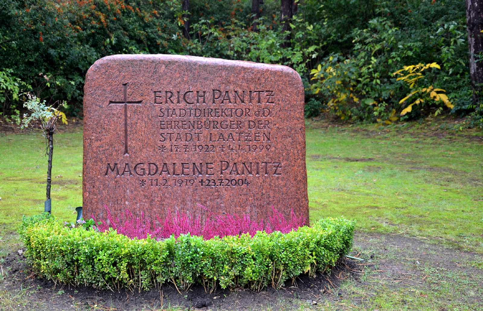 Das nahe dem Haupteingang vom Friedhof im Heidfeld in Laatzen aufgestellte Grabmal für Erich Panitz (17.4.1922-4.4.1999) und Magdalene (11. Februar 1919 - 23. Juli 2004) ehrt den ehemaligen Stadtdirektor und Ehrenbürger der Stadt Laatzen, der unter anderem als einer der Initiatoren und Mitbegünder des Großraums Hannover (heute: Region Hannover) gilt ...